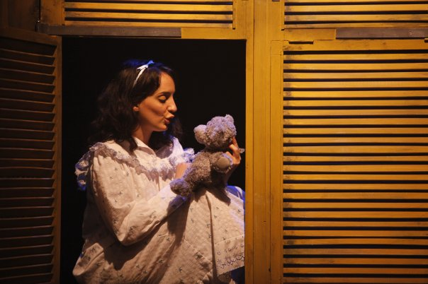 רוני דותן